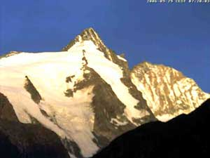 Blick vom Glocknerhaus auf den Großglockner, rechts davon die Glocknerwand. Gletscher: Hofmannskees und Kleinglocknerkees.